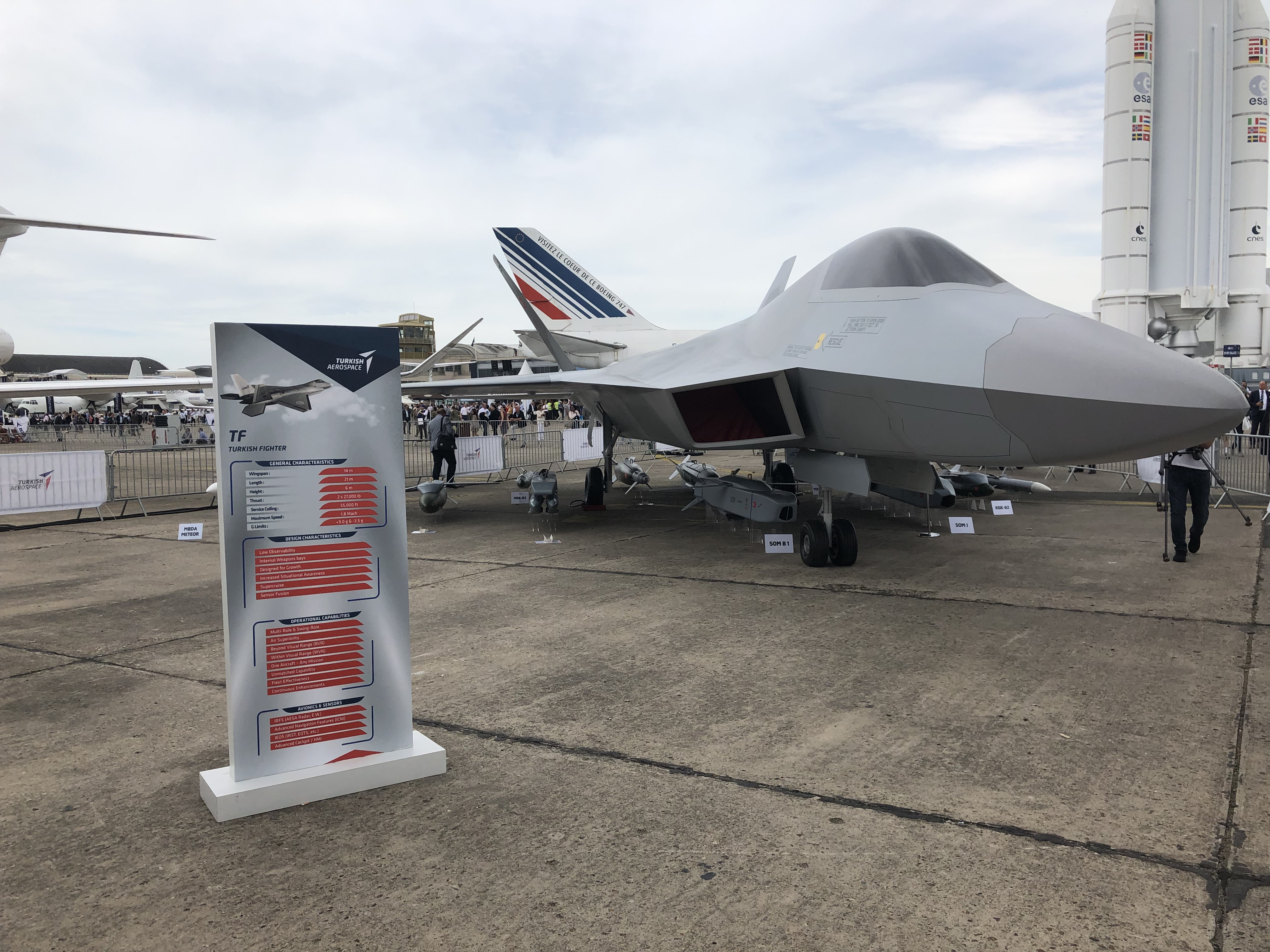 Maquette du TF-X de Turkish Aerospace Industries